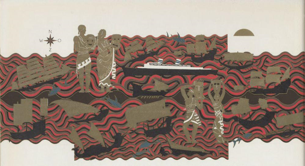 Reijer Stolk lakpaneel (ingang theater kajuitsklasse 'Nieuw Amsterdam', 1938) "Reyer Stolk: Lakpaneel, voorstellende de verspreiding van de tooneelspeelkunst door de handelsscheepvaart. Boven: Noordelijk Halfrond, beneden: Zuidelijk Halfrond. Ingang theater kajuitsklasse. Architect H. Th. Wijdeveld."